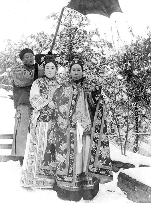 Empress Dowager Cixi, behind the Empress: Princess Der Ling